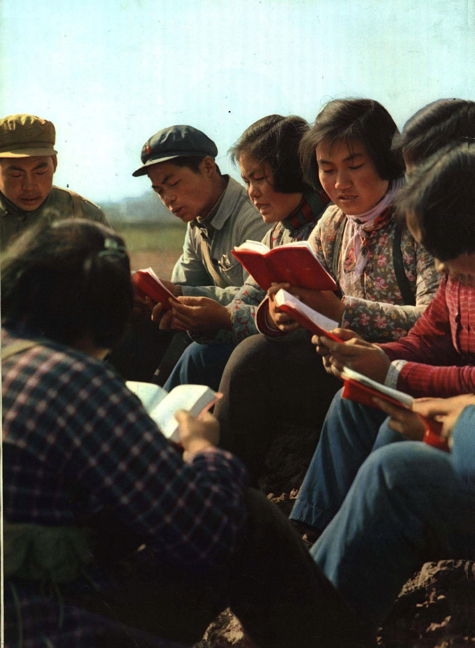 1967-05 民众学习毛主席语录